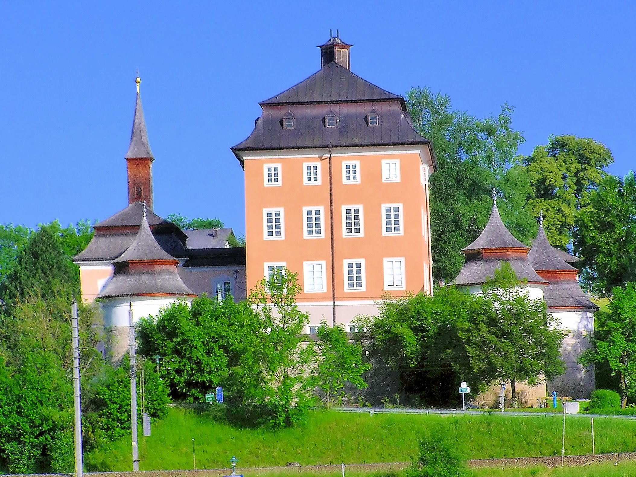 Schloss Seeburg in Seekirchen am Wallersee, Bundesland Salzburg in Österreich von Südosten.